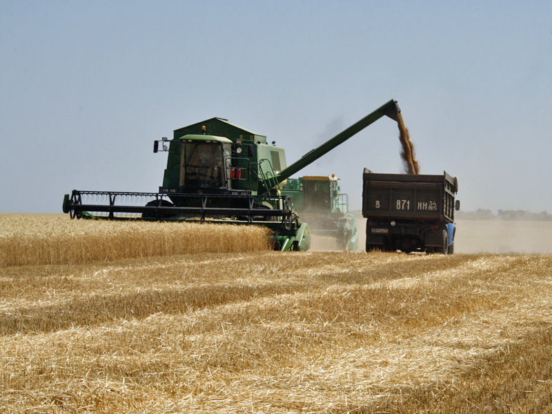 Уборка урожая в Волгоградской области. На заднем плане - комбайн Дон-1500.